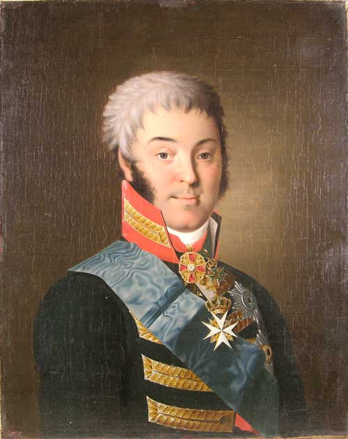 Аргунов Николай Иванович. 1771 - после 1829 Портрет графа Николая Петровича Шереметева. 1801-1803 Холст, масло. 67х53,5. Ж-509 Ниже левого плеча авторская подпись: N.Аргуновъ Пост. в 1924 из Ростовского Спасо-Яковлевского монастыря